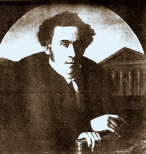 Porträt des Aachener Architekten und Baumeisters Johann Peter Cremer